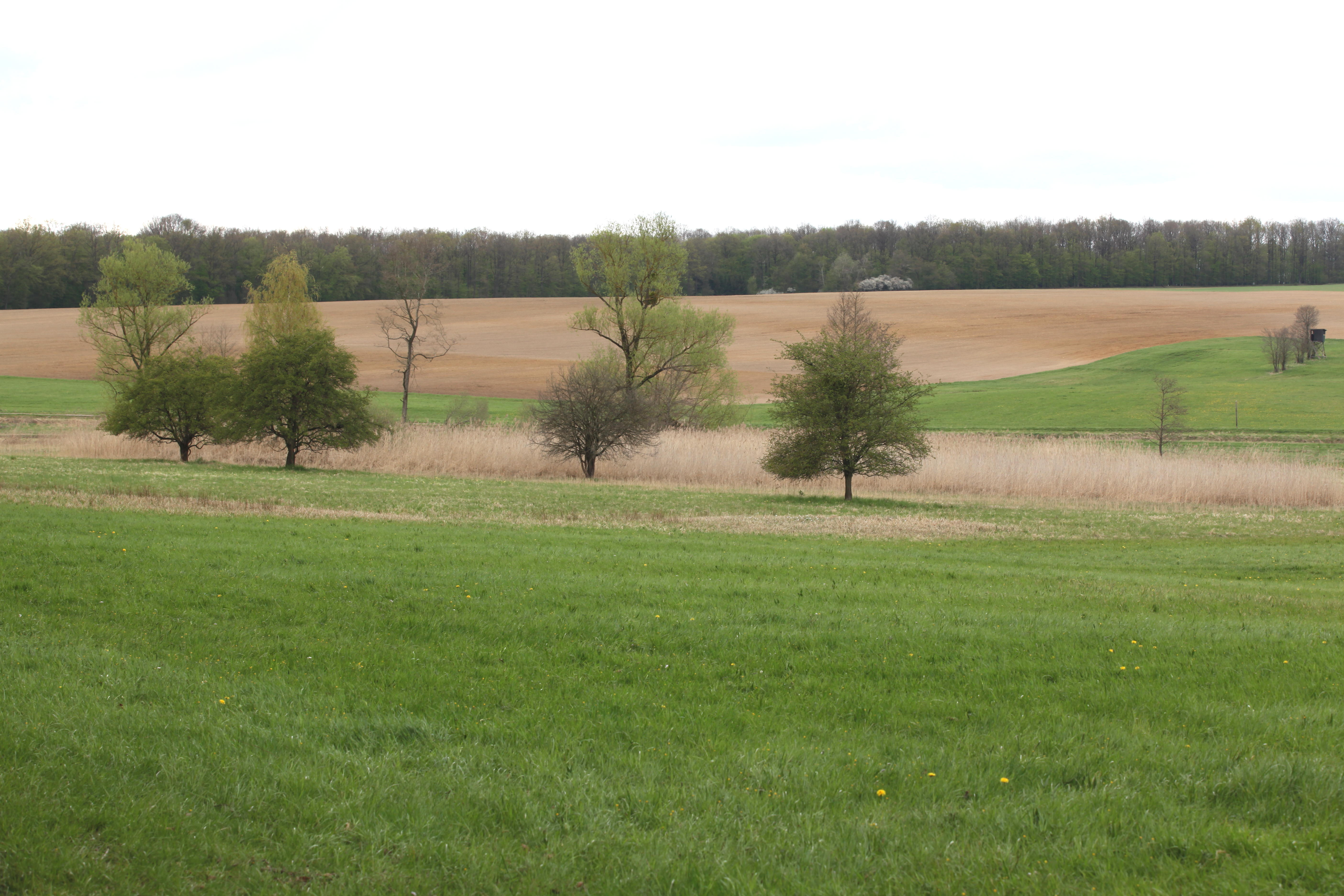 Baumwiesen bei Roßfeld, NSG „Eichelberg und Bischofsau“